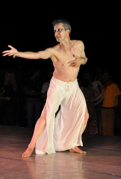 Impronta al Cuadrado, maestro Elio Montiel